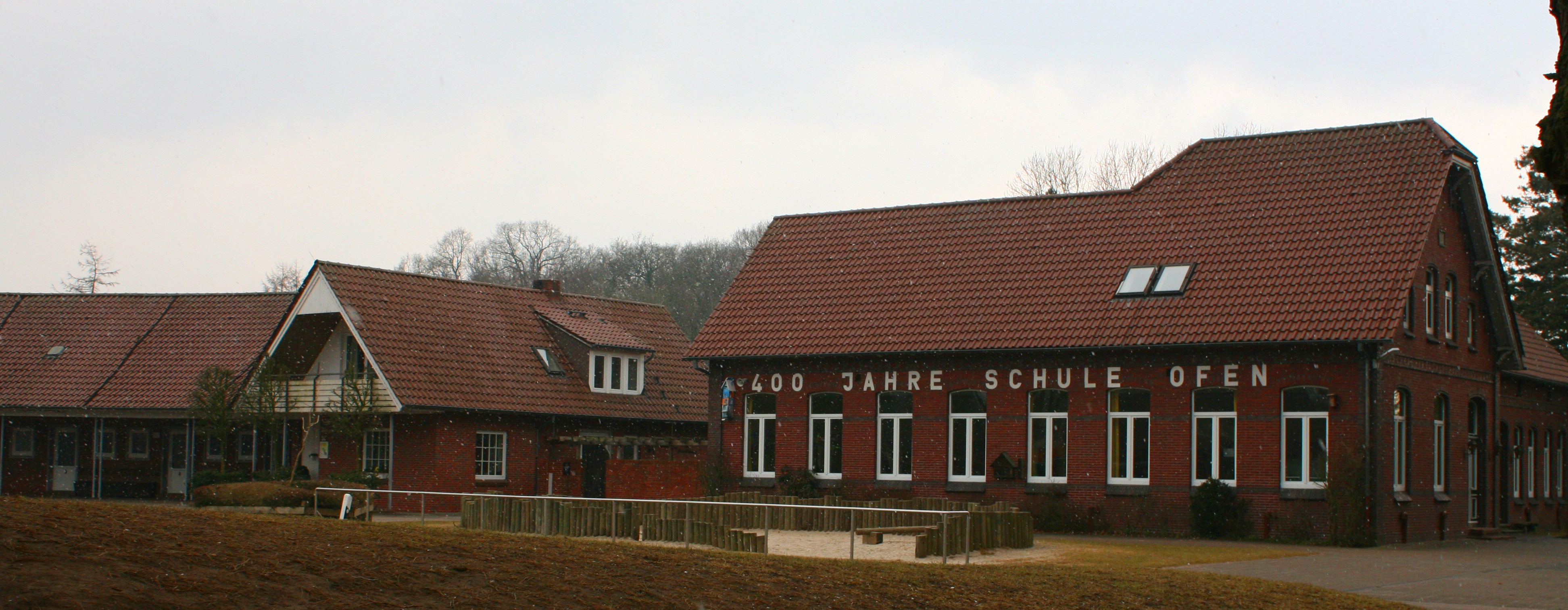 Schule in Ofen